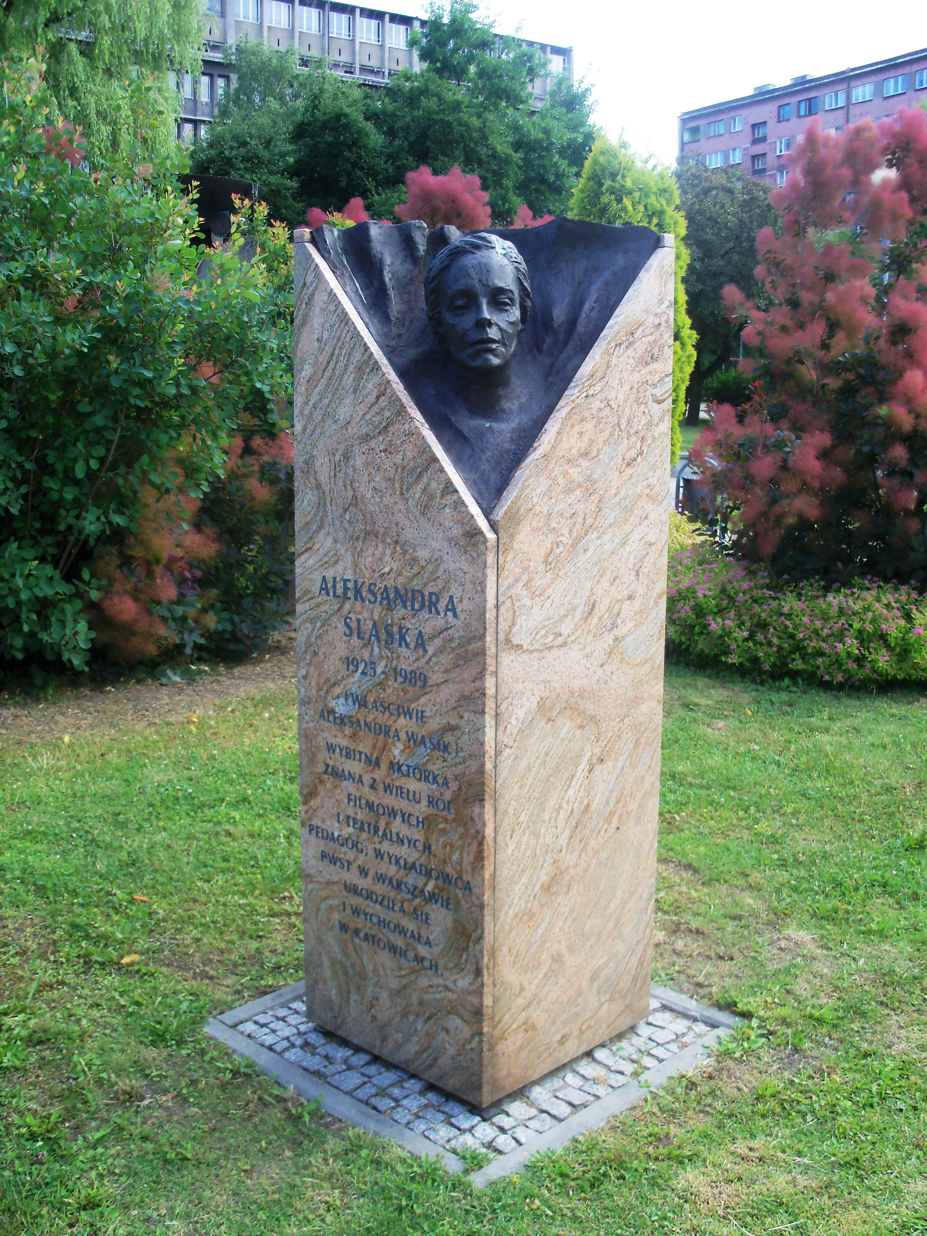 Galeria Artystyczna na placu Grunwaldzkim w Katowicach: Rzeźba przedstawiająca Aleksandrę Śląską